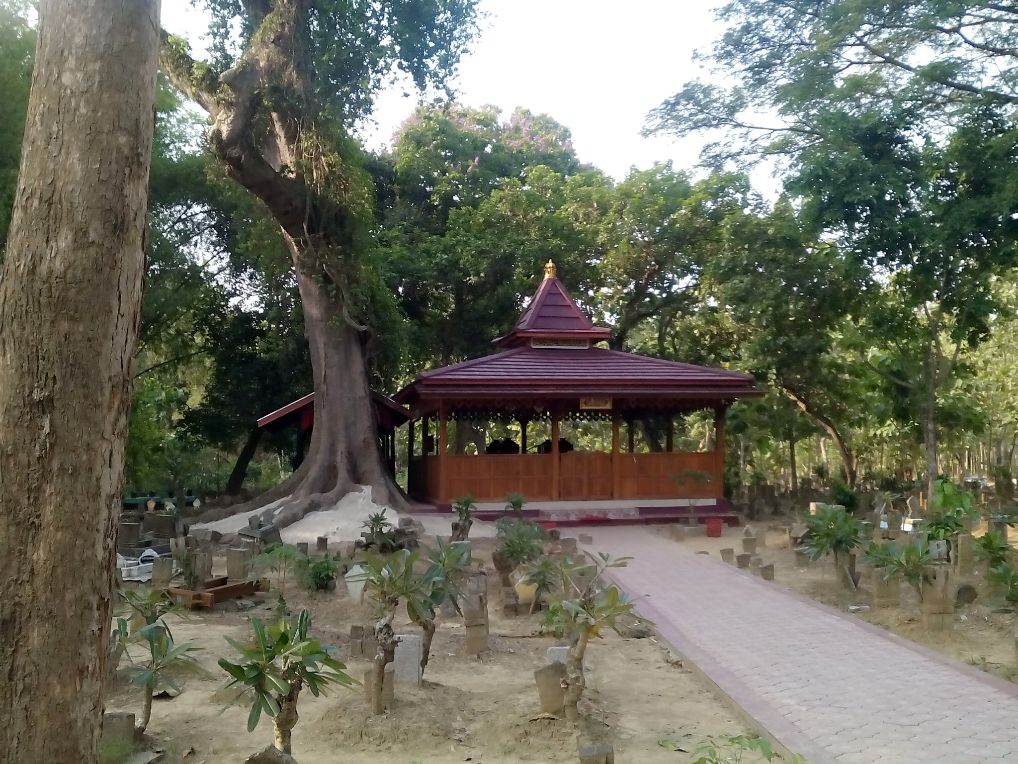 Sesepuh Desa Pekalongan Kec. Winong Kab. Pati